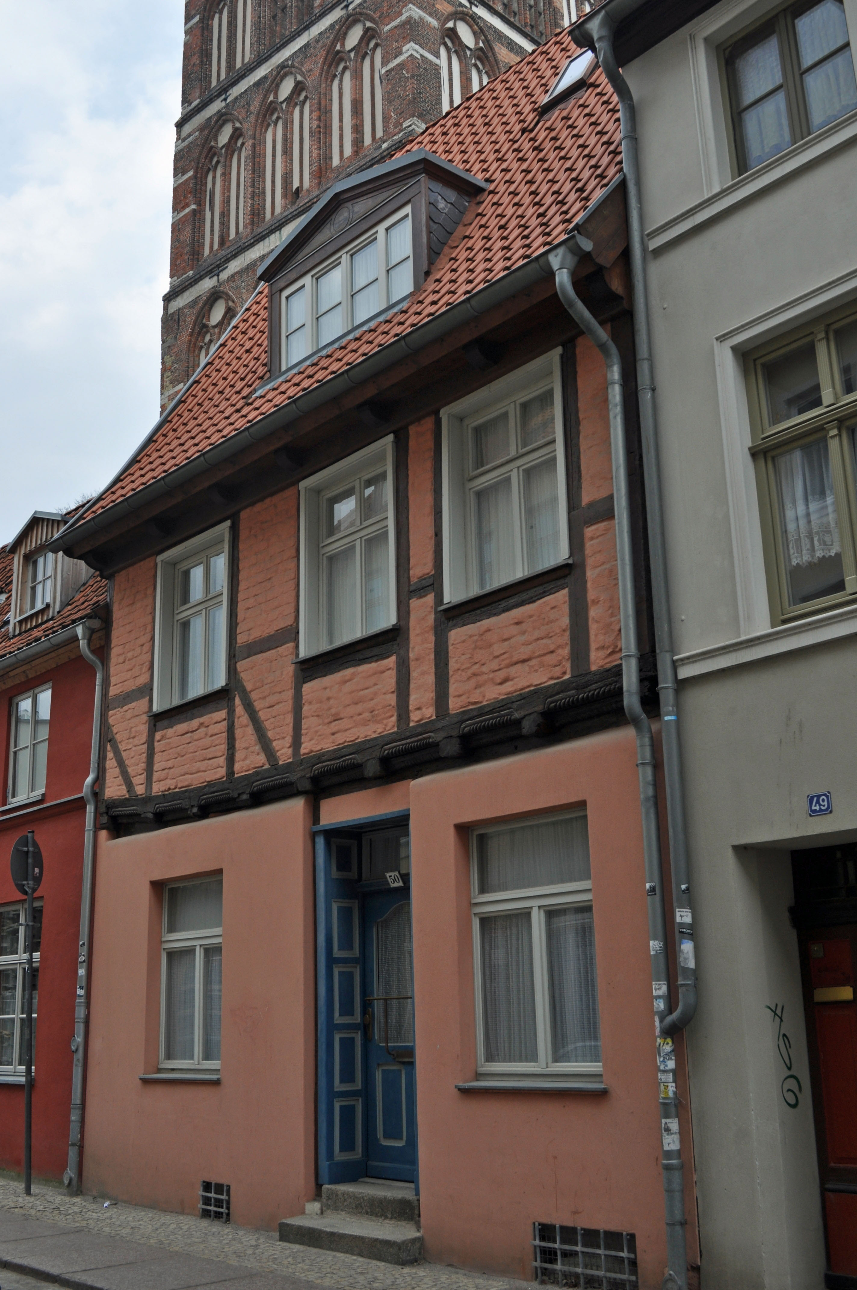 Gebäude bzw. Gebäudedetail in Stralsund. Straße und Hausnummer siehe Dateiname.